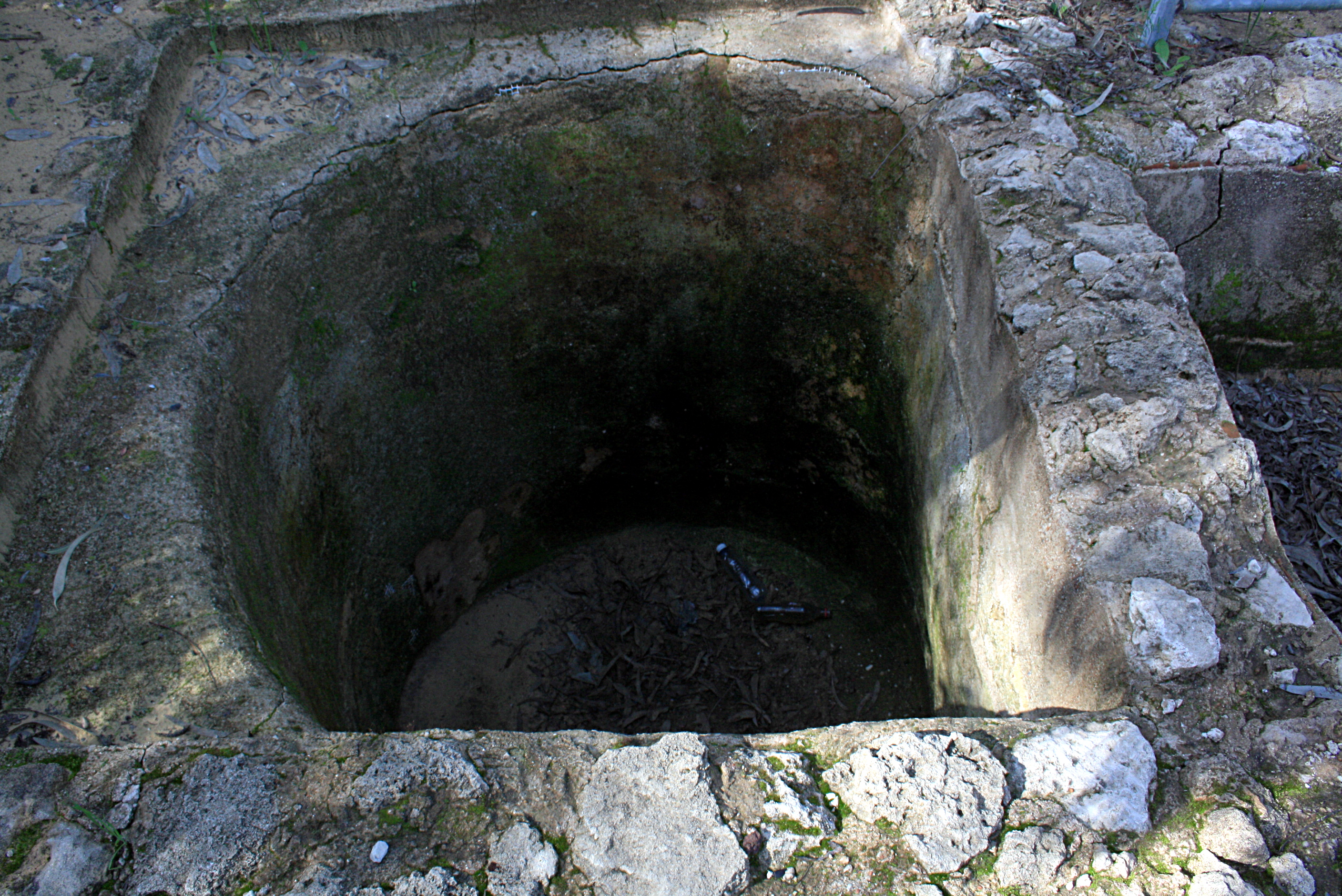 גת מהתקופה ההלניסטית בגן הגתות, ראשון לציון. בור איגום התירוש.